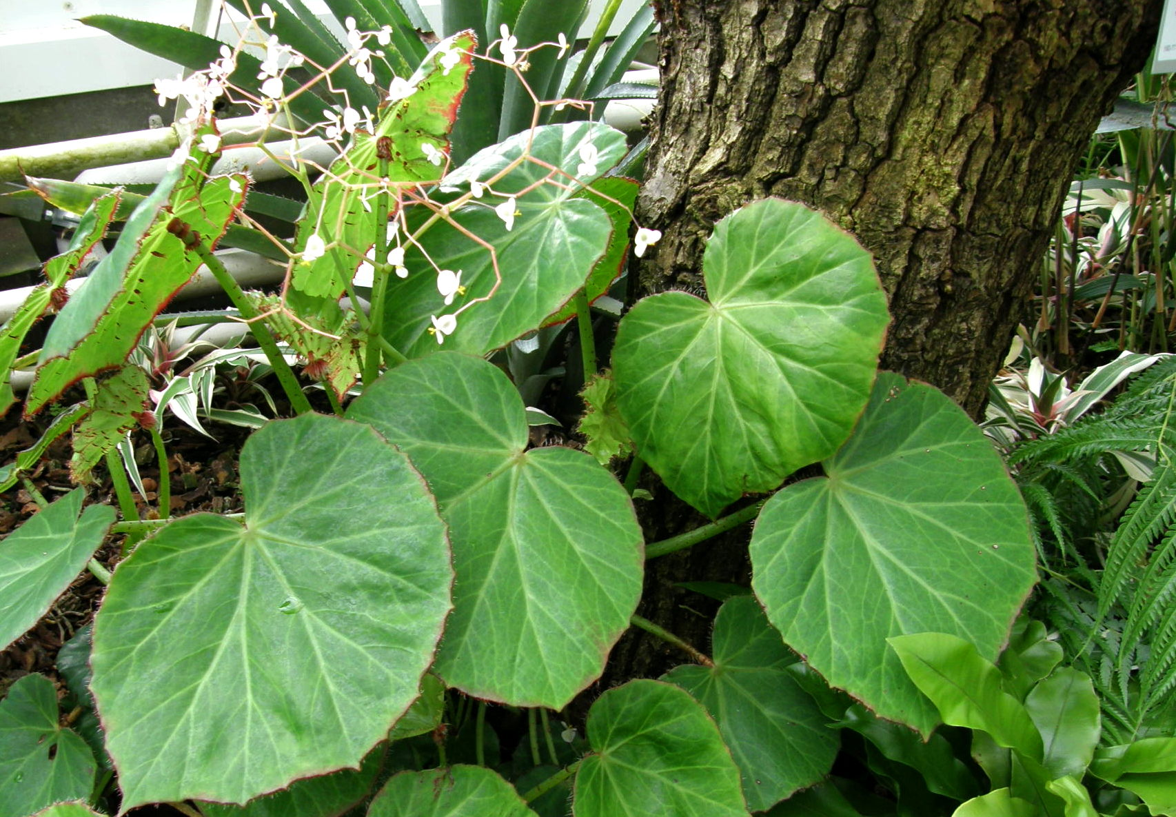 Begonia manicata Brongn. dans la serre du Botanischer Garten de Berlin-Dahlem